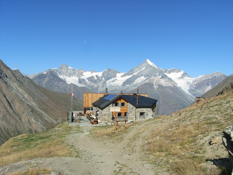 Täschhütte bei Täsch - nahe Zermatt